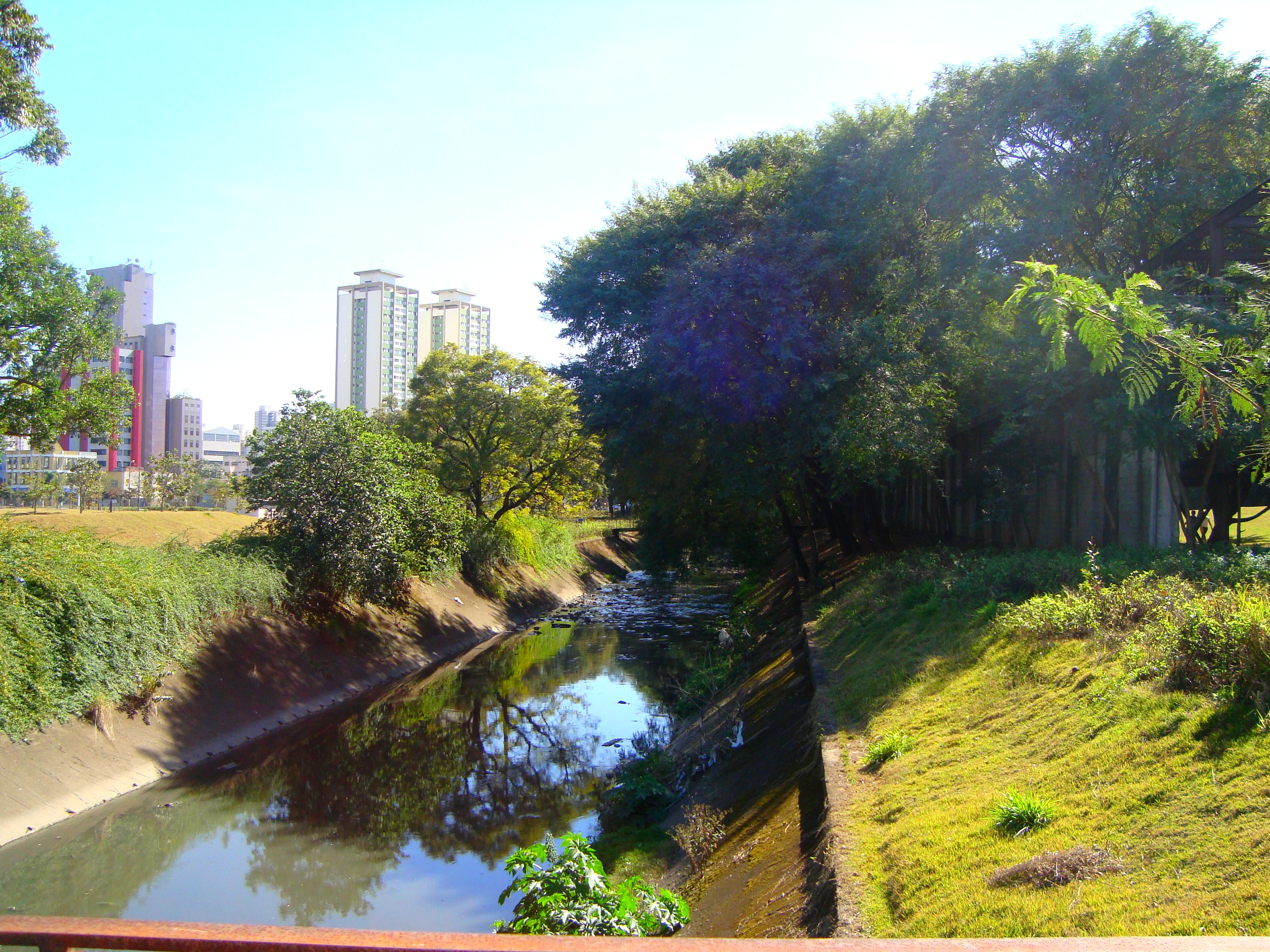 Córrego Carandiru no bairro homônimo, Zona Norte de São Paulo/SP